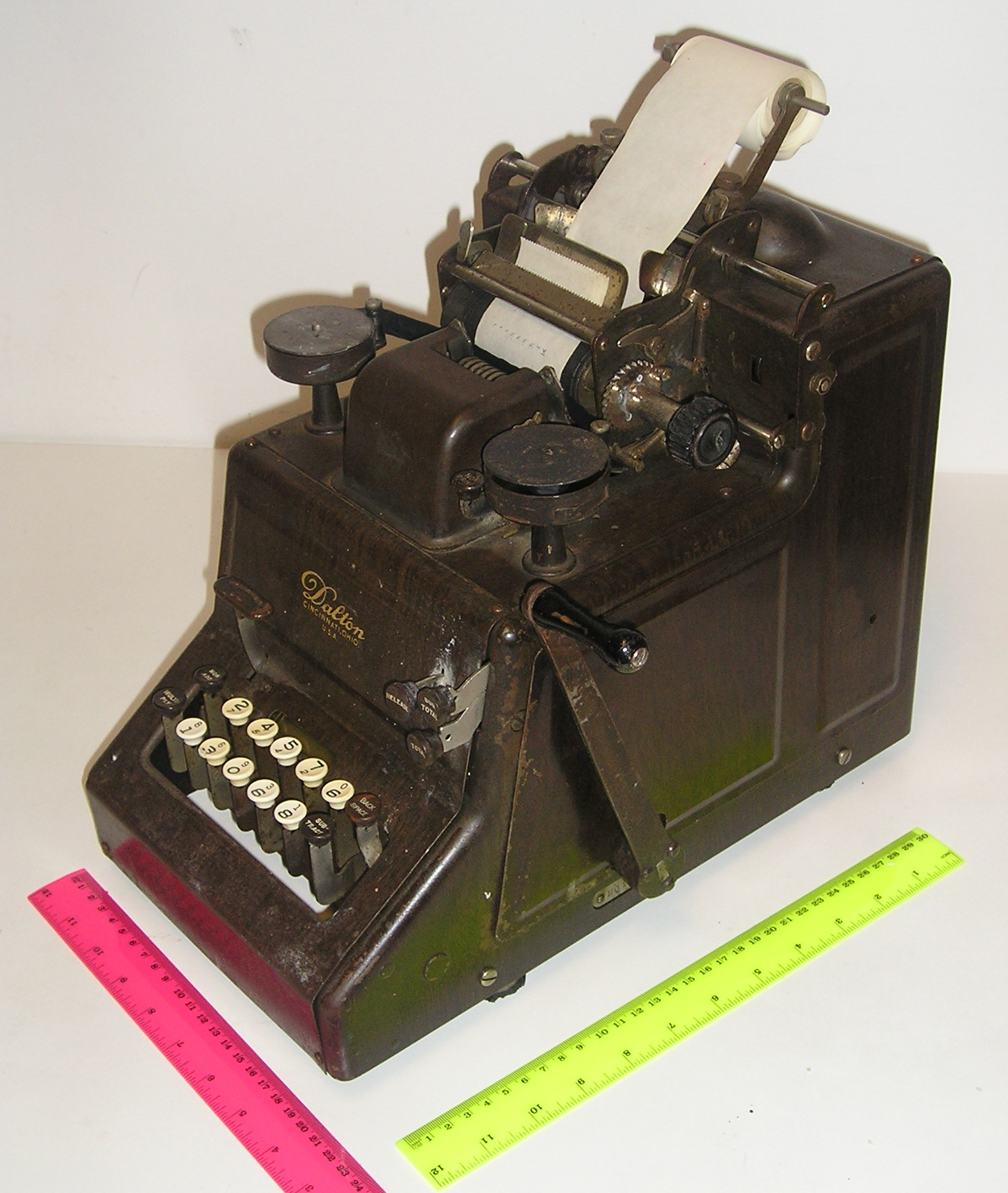 Addizionatrice Dalton degli anni '30 Queste macchine furono inventate nel 1902 da Hubert Hopkins per la Dalton Adding Machine Company e rappresentano il primo esempio di addizionatrice a 10 tasti che abbia avuto successo commerciale. Autore: Andrea Celli --Ancelli (msg) 17:02, 5 feb 2009 (CET) Fonte: foto personale di oggetto di mia proprietà